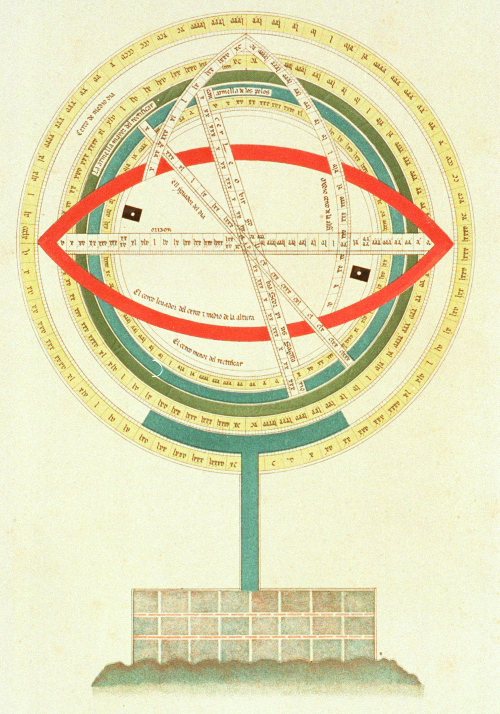 Armilles ou sphere armillaire, illustration du Livre du savoir d'Alphonse X de Castille.